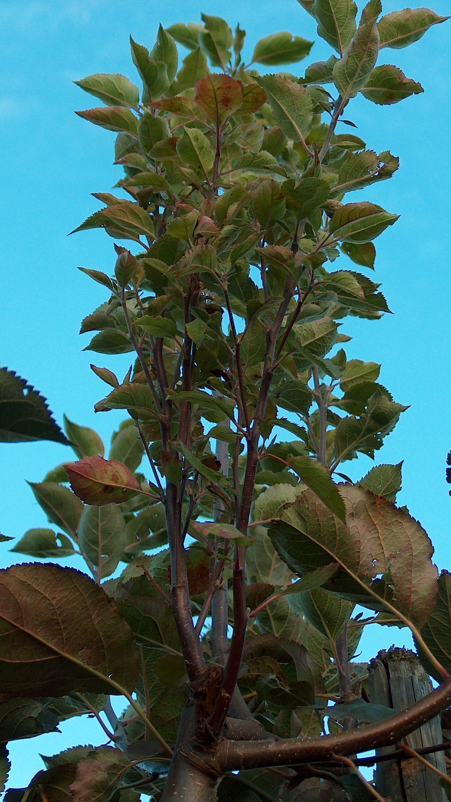 Hexenbesen am Gipfel eines Baumes der Sorte Boskoop mit Apfeltriebsucht